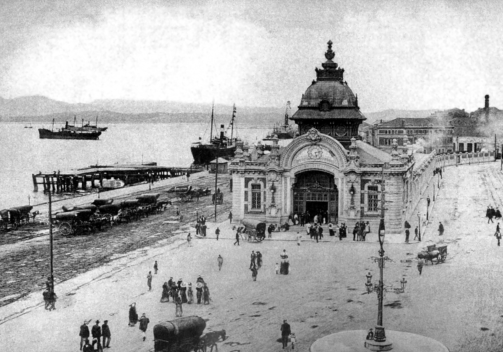 Estación de ferrocarril de la Costa de Santander (Cantabria, España). Circa 1907